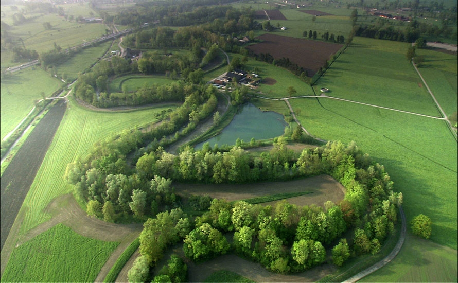 die Mäander der Dornbirner Ache auf Höhe des "Möckleburs"